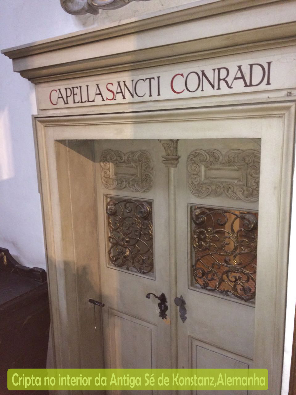 Cripta no Anterior da Antiga Sé de Konstanz, Alemanha